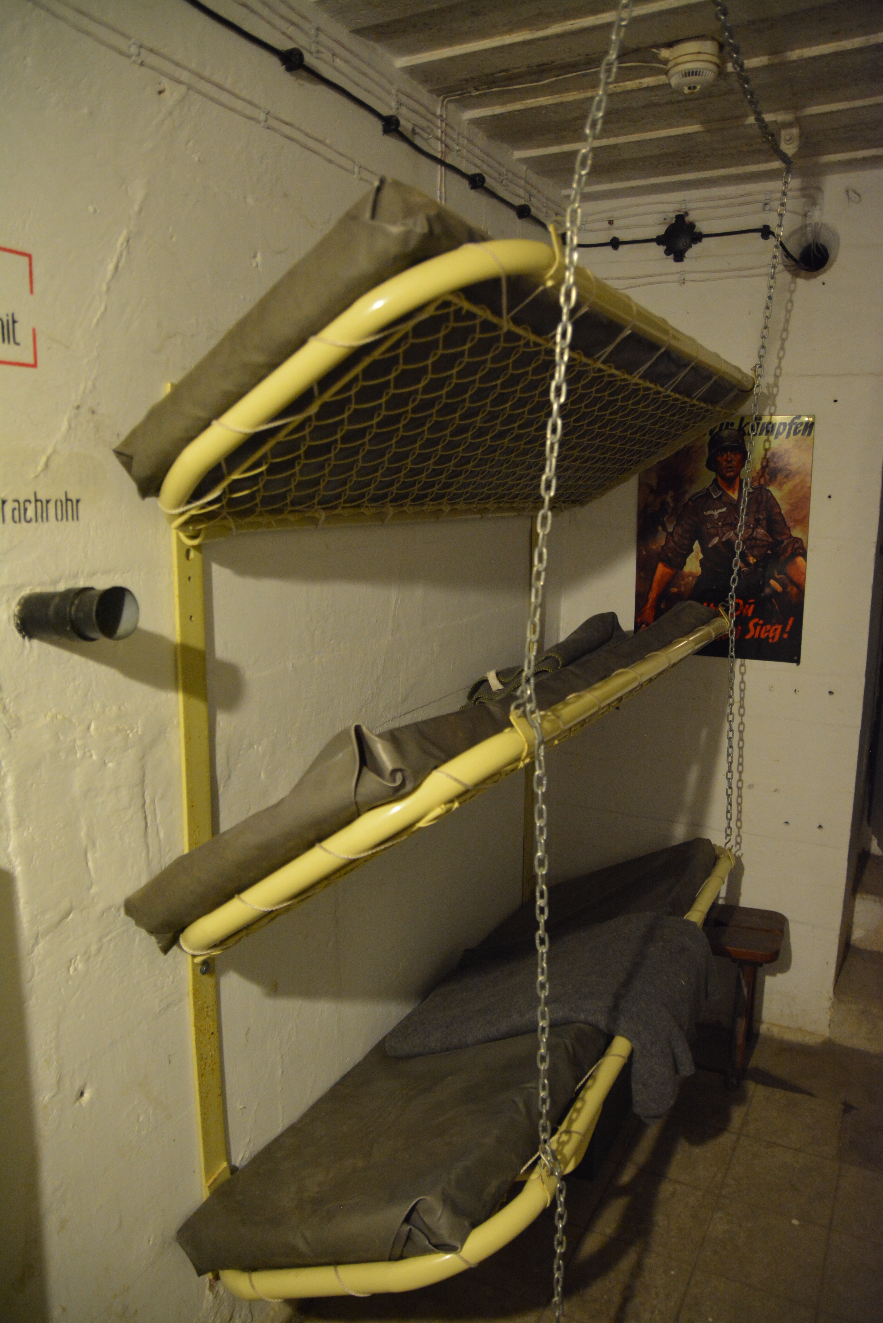 MRU - Muzeum Fortyfikacji i Nietoperzy w Pniewie